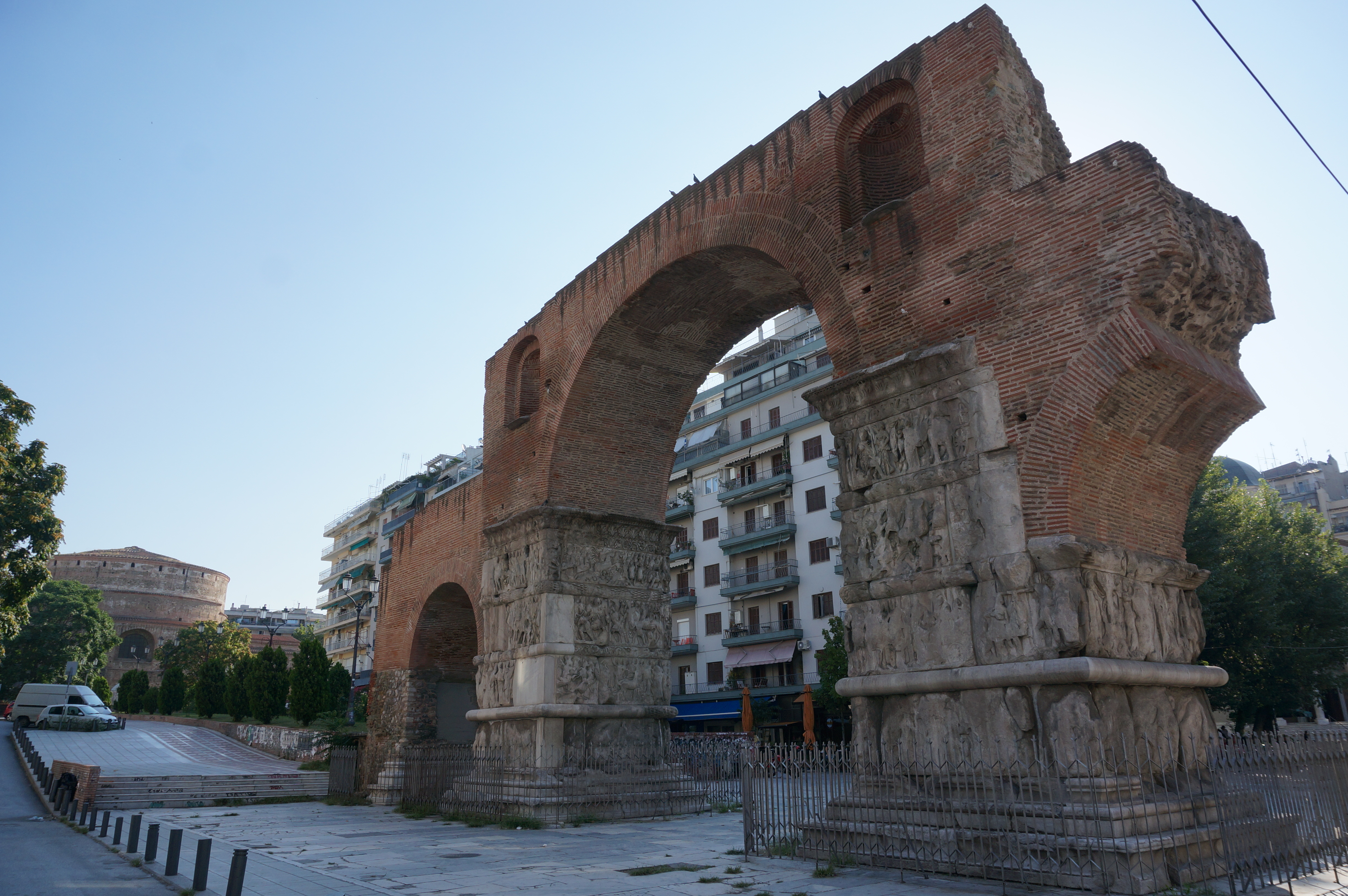 vue de l'arc de Galère.